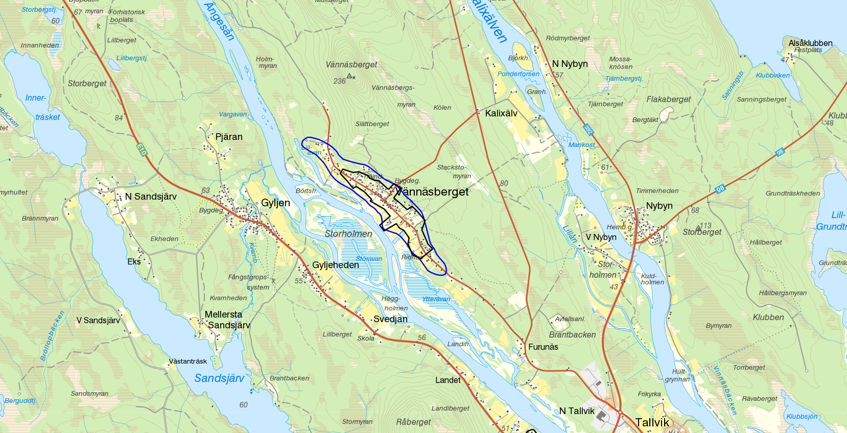 Småorten Vännäsberget med gränserna från Statistiska centralbyråns småortsavgränsning 2010 i svart och tätorten Vännäsberget från tätortsavgränsningen 2005 i blått. Bakgrundskarta från Lantmäteriet, skala 1:30 236.